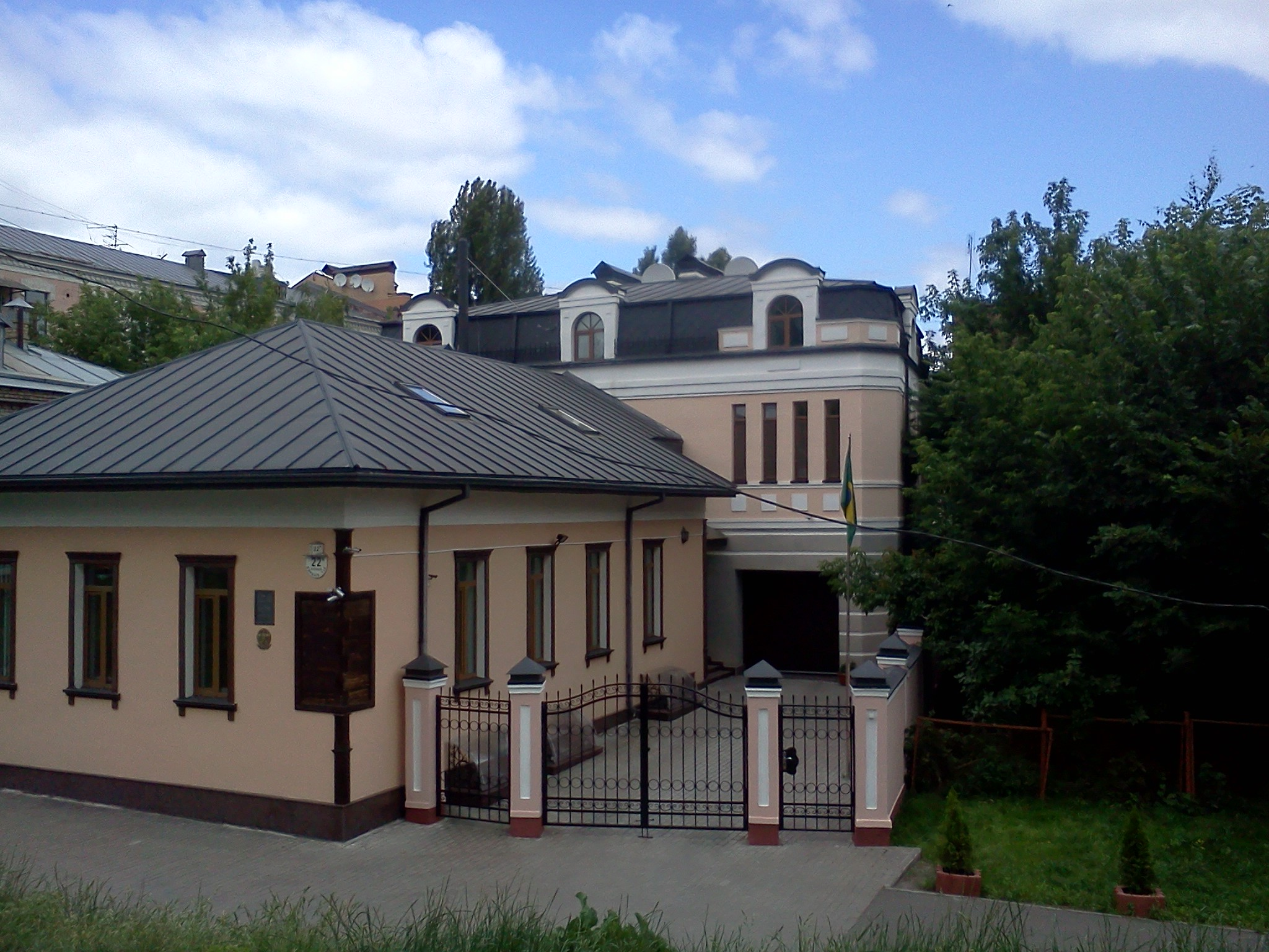 Посольство Бразилії в Києві